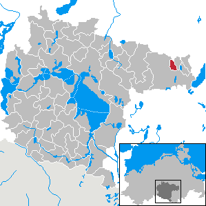 Puchow im Landkreis Müritz, Mecklenburg-Vorpommern